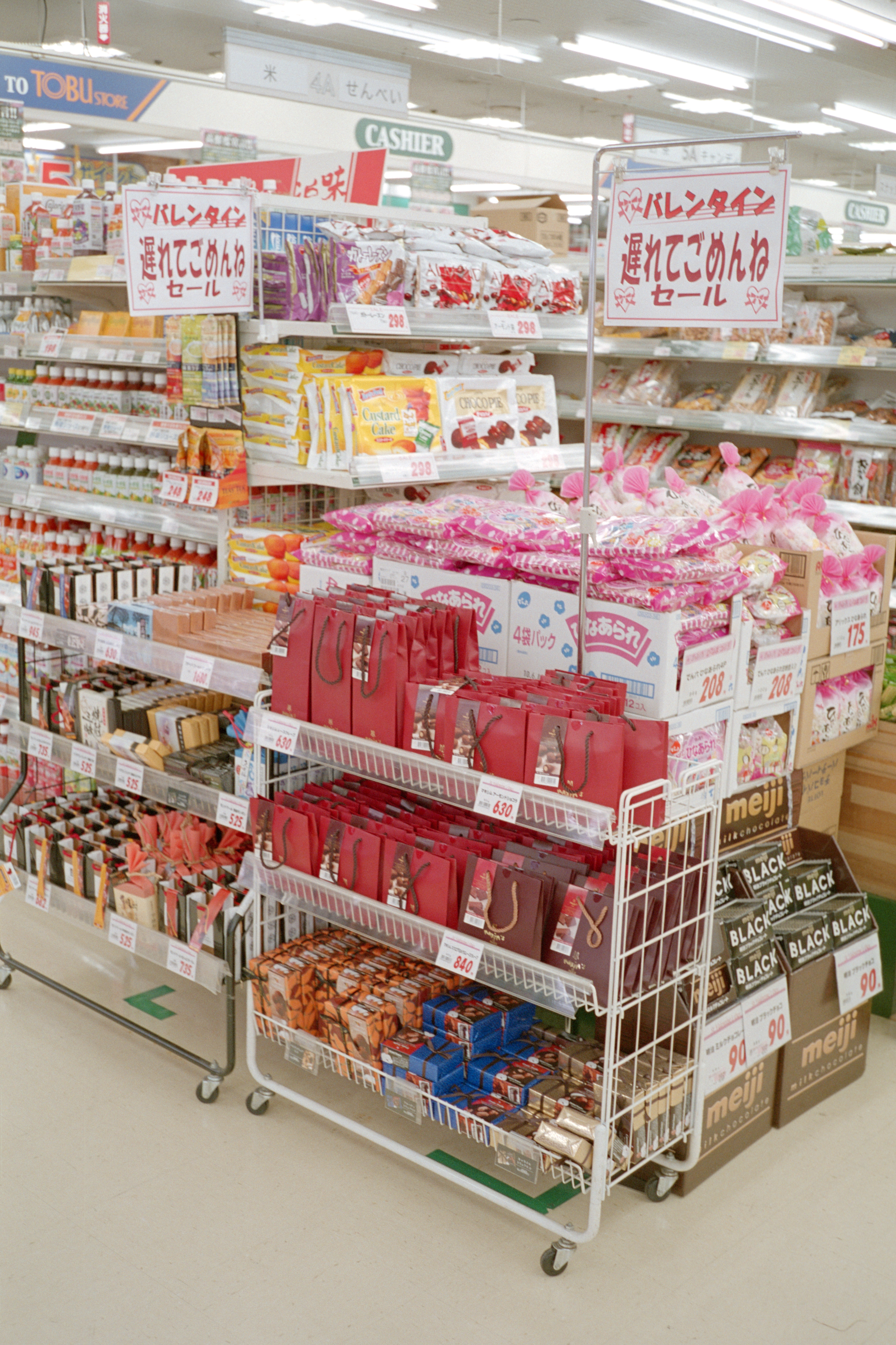 今年は15日に渡したOLの方もいらっしゃるようで